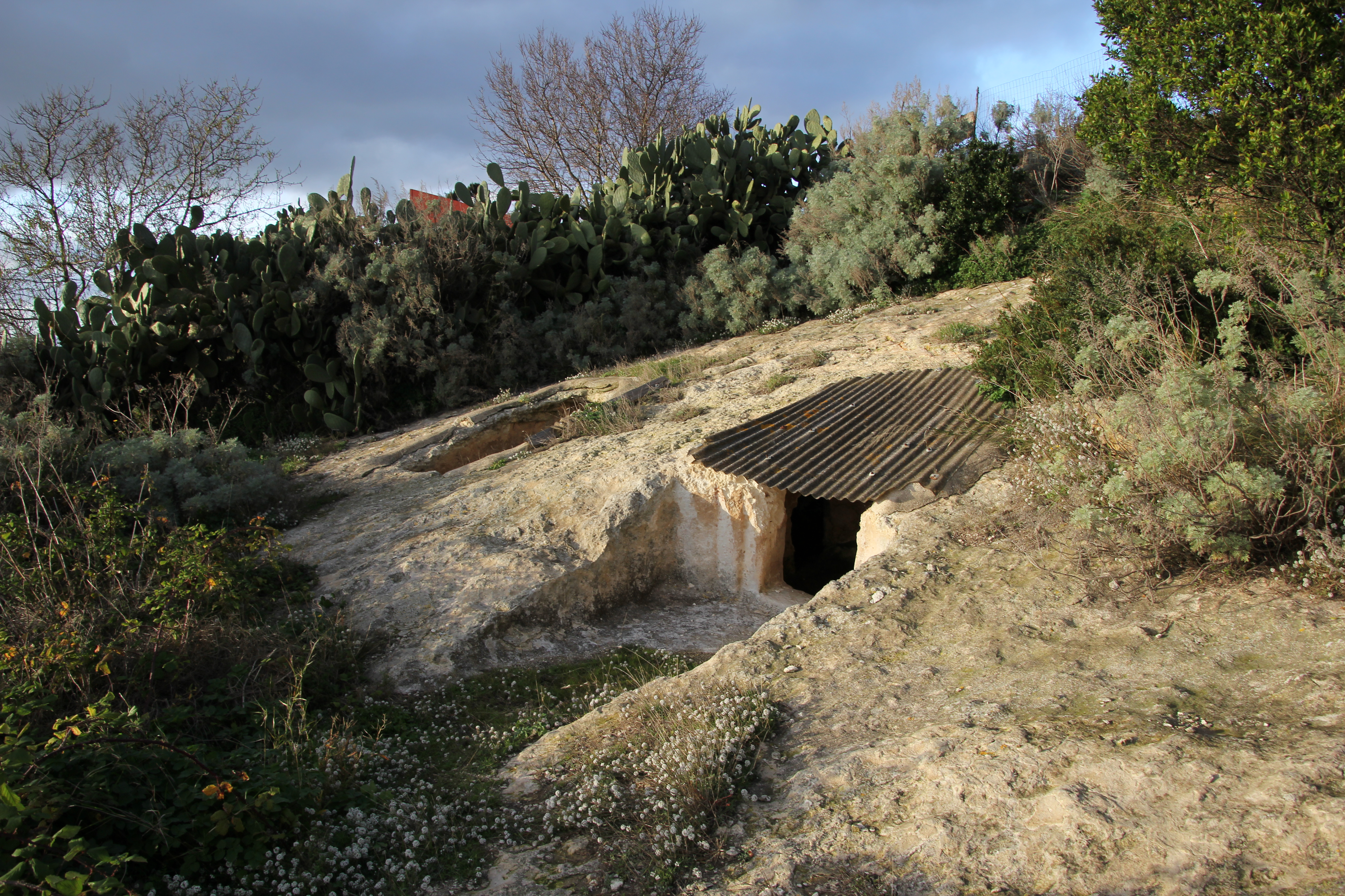 Ossi, necropoli di Noeddale